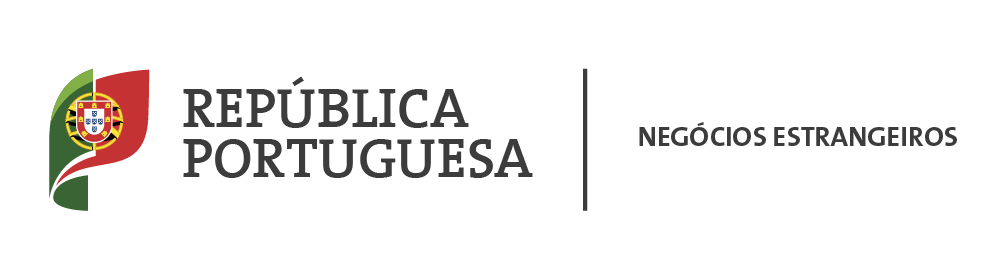 Logotipo del Ministerio de Relaciones Exteriores de Portugal.